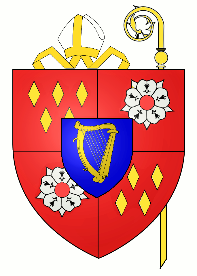 La Vieille-Lyre, Eure, Abbaye de Lyre, Blason (image du domaine public modifiée)